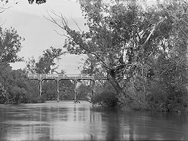 Le pont Pinjarra sur le fleuve Murray (Australie occidentale)